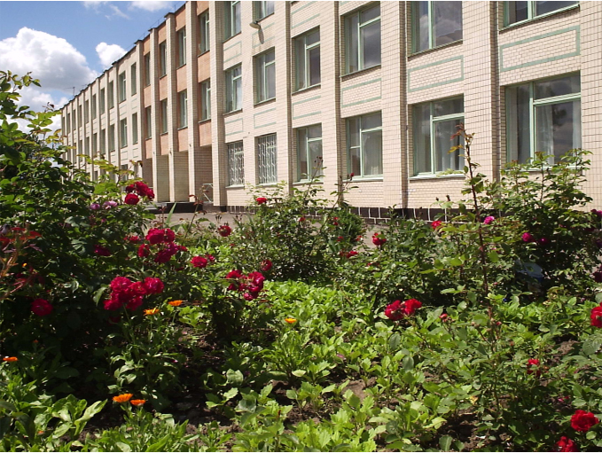 Красилівська ЗОШ №2 влітку